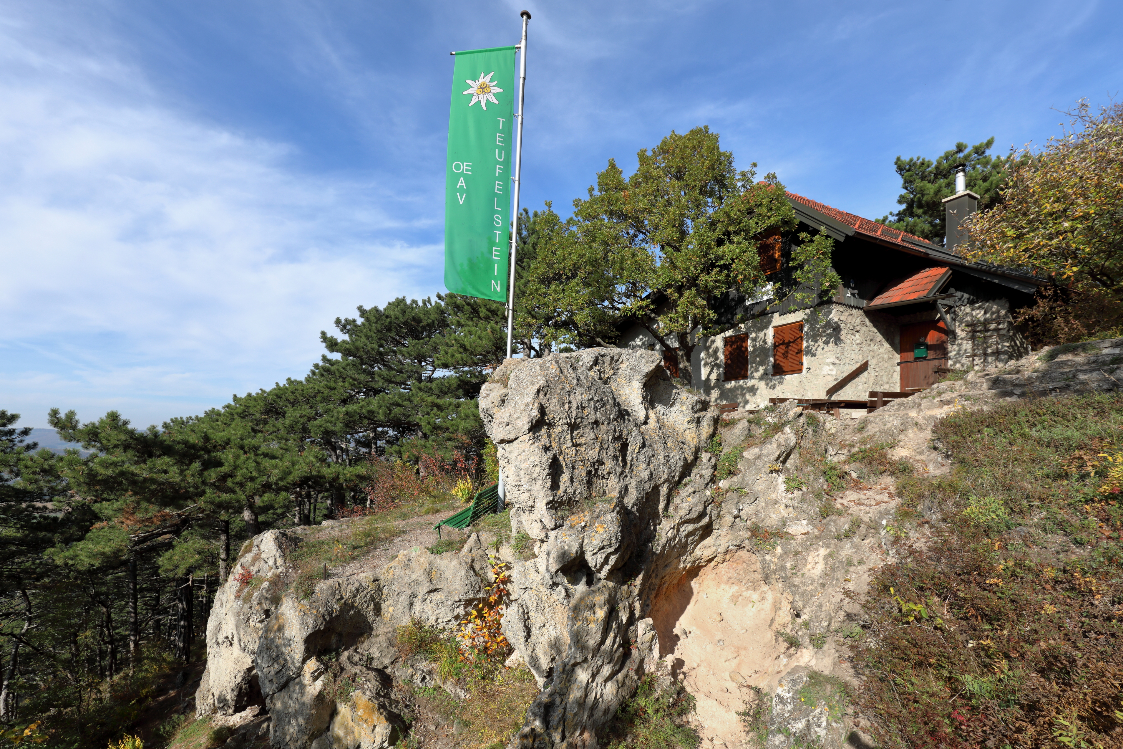 Gipfel des Teufelsteins mit der Teufelsteinhütte in der niederösterreichischen Marktgemeinde Perchtoldsdorf. Die zwischen Kaltenleutgeben und Perchtoldsdorf und auf 542 m (lt. BEV) gelegene Schutzhütte wurde ab 1931 vom Österreichischen Gebirgsverein errichtet, am 12. Juni 1932 eröffnet und 1973 erweitert.